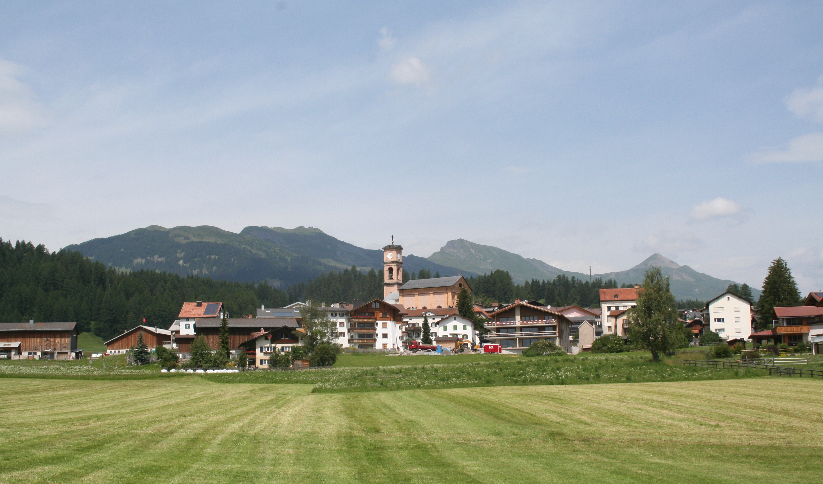 Lantsch